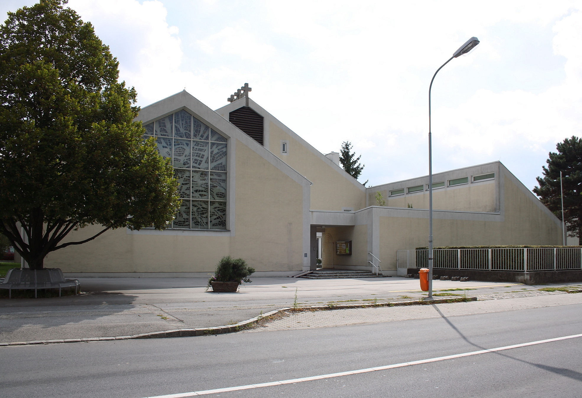 Die nach Plänen von Clemens Holzmeister errichtete röm.-kath. Pfarrkirche in Zwölfaxing, Niederösterreich.